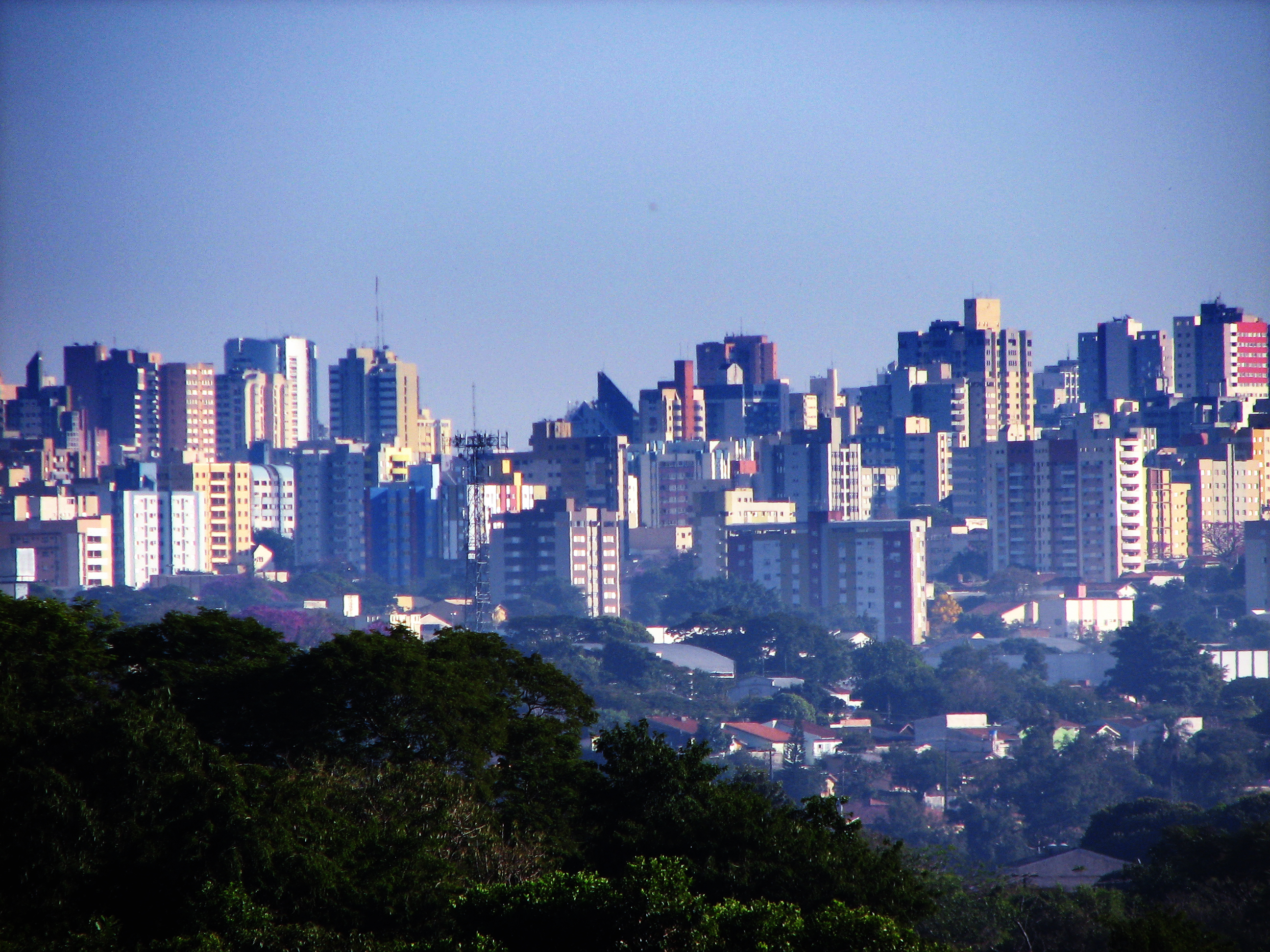 Vista da cidade de Londrina, Paraná